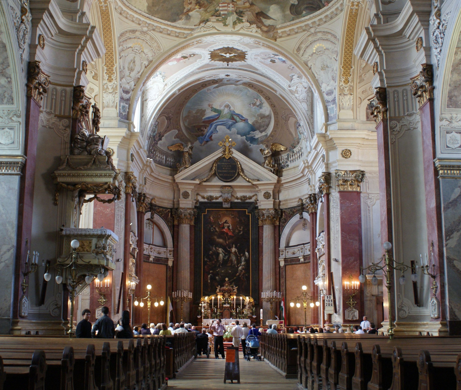 R. k. plébánia (Kecskemét, Kossuth tér 2.) This is a photo of a monument in Hungary. Identifier: 2234